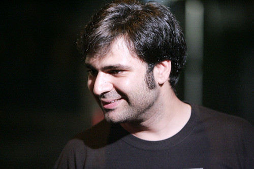 Director Bülent Gencdemir